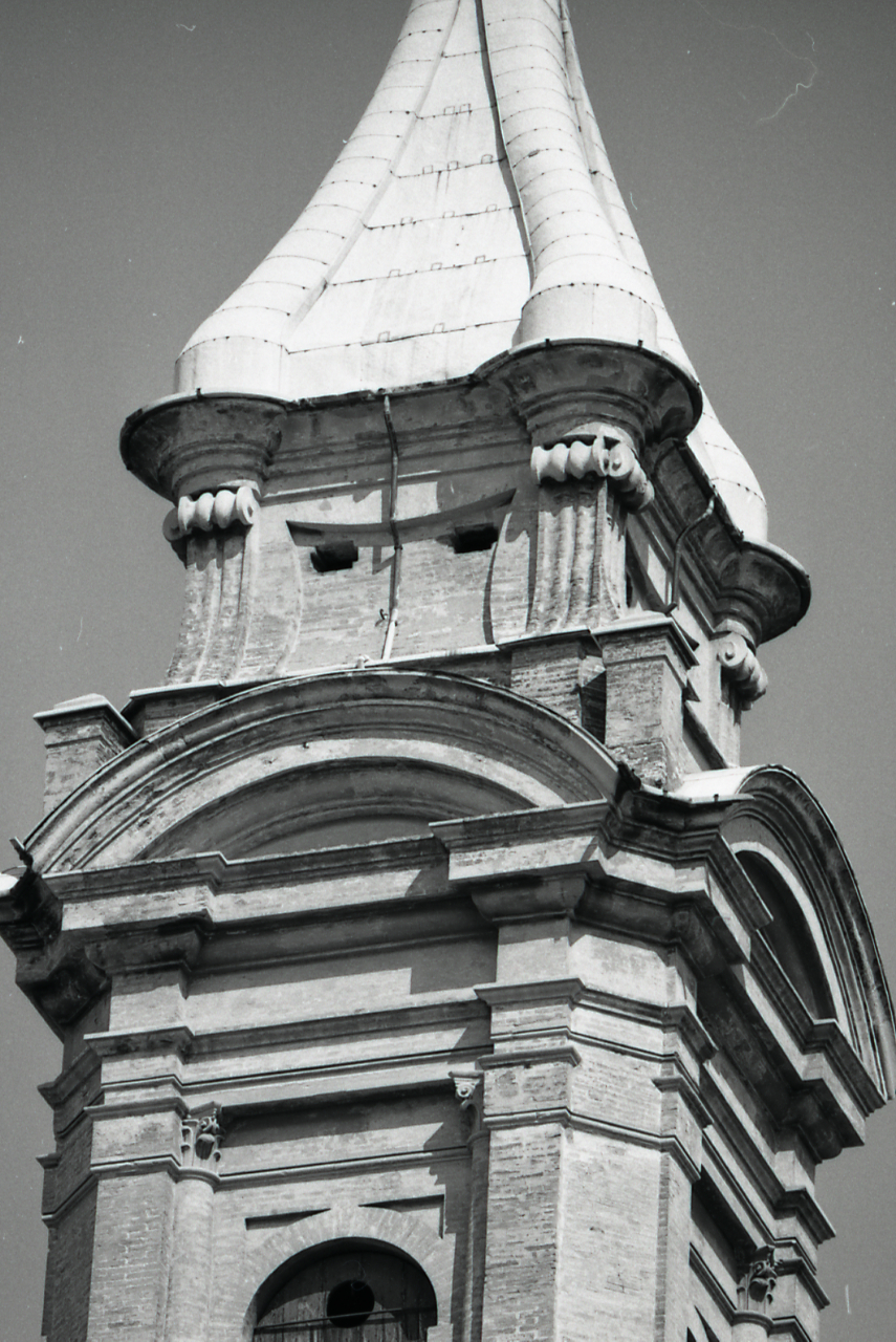 Servizio fotografico : Bologna, 1968 / Paolo Monti. - Strisce: 6, Fotogrammi complessivi: 34 : Negativo b/n, gelatina bromuro d'argento/ pellicola ; 35 mm. - ((I fotogrammi hanno una doppia numerazione. . - Sul portanegativi: Nikon Agfa 21. - Sul dorso del portanegativi Monti specifica: "Matteucci. Alfa". - Occasione: Pubblicazione: Anna Maria MATTEUCCI, Carlo Francesco Dotti e l'architettura bolognese del Settecento, Bologna, Edizioni Alfa, 1968